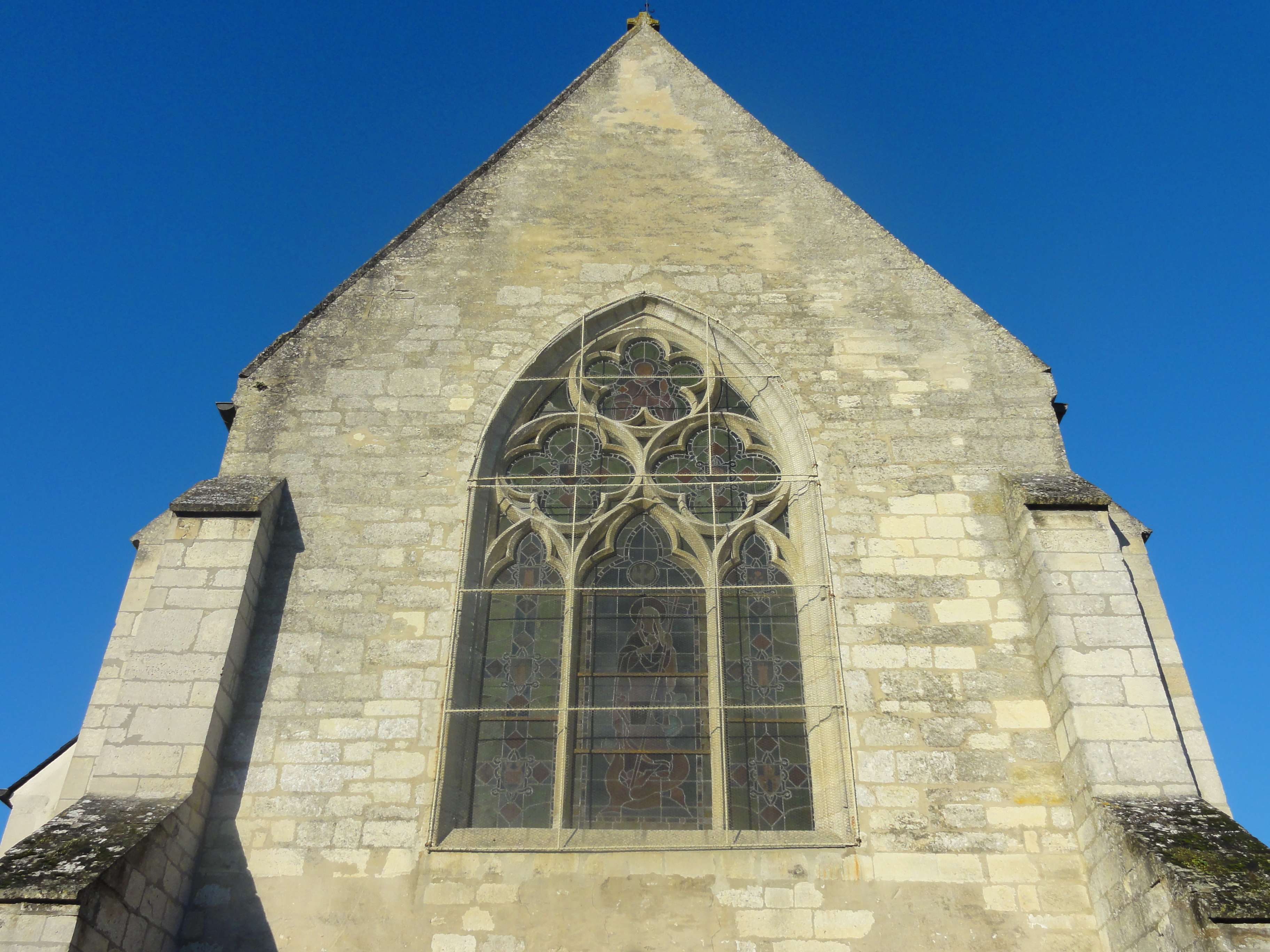 Chevet du chœur.